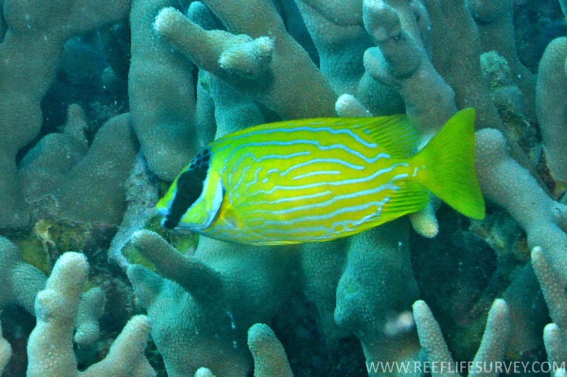 Siganus puellus subadulto en la Gran Barrera de Arrecifes, Queensland, Australia